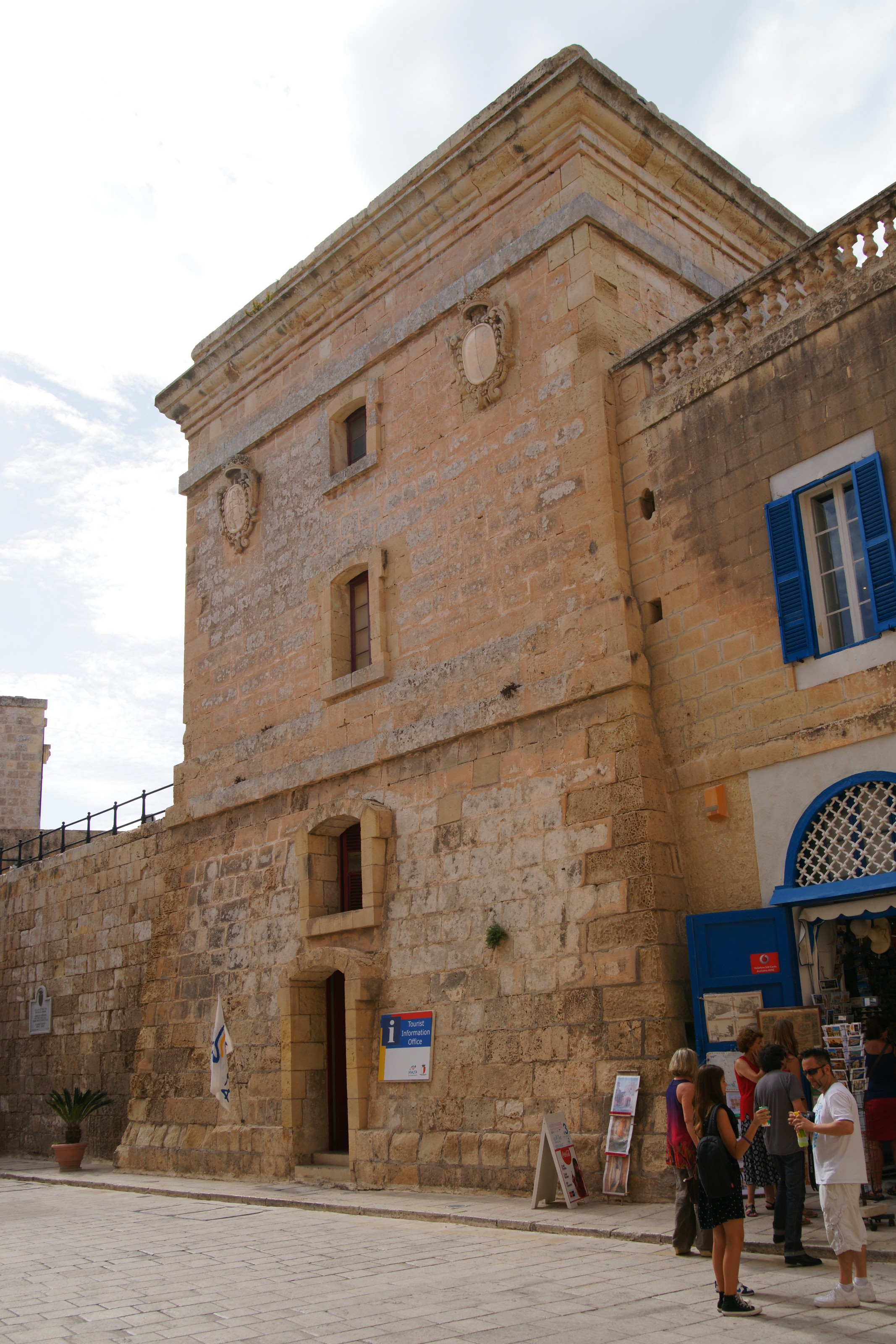 Mdina: Torre dello Stendardo